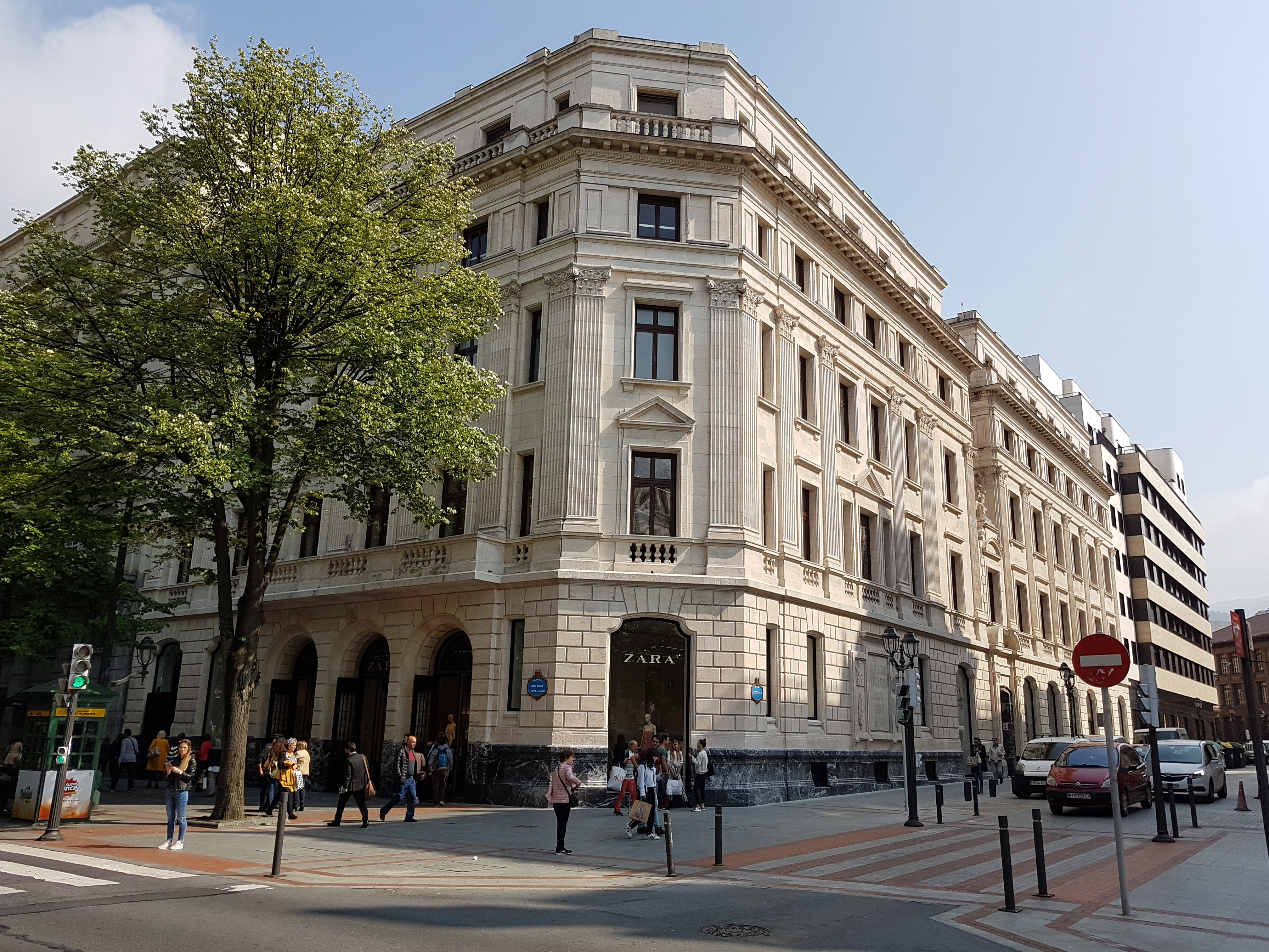 Edificio Zara Bilbao, Gran Vía 23.